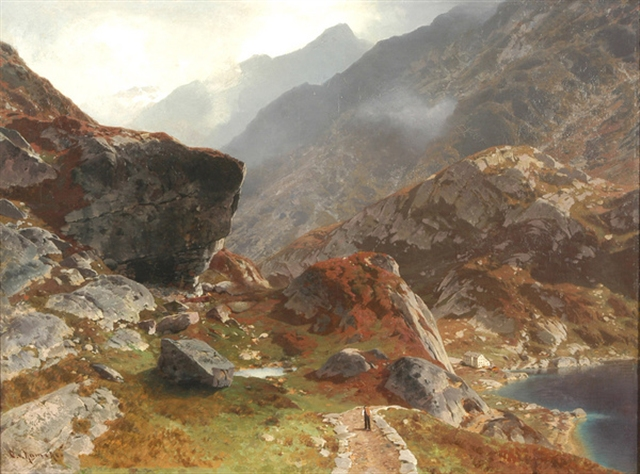 Grimsel - Blick auf das Hospiz und den See